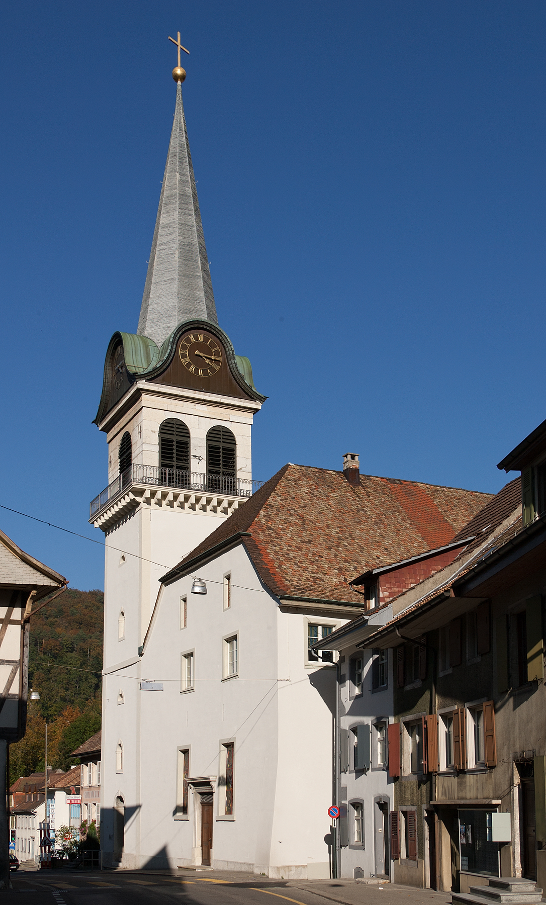 Evangelisch-Reformierte Kirche in Waldenburg (BL)